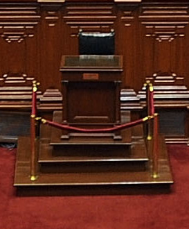 Comenzó, a las 9 y 14 minutos de esta mañana, la sesión matutina del Pleno del Congreso, con la dirección de su presidente, congresista Daniel Abugattás Majluf. En la reunión participan inicialmente 63 congresistas. El quórum para realizar la presente asamblea es de 56 parlamentarios presentes en el hemiciclo.